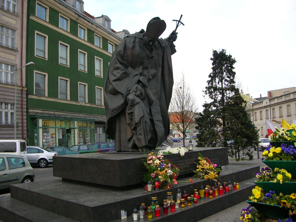 Pomnik Jana Pawła II. Autor : Bartek Wawraszko (Bast)